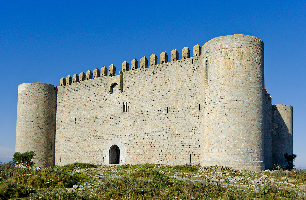 Castell de Montgrí (Torroella de Montgrí)